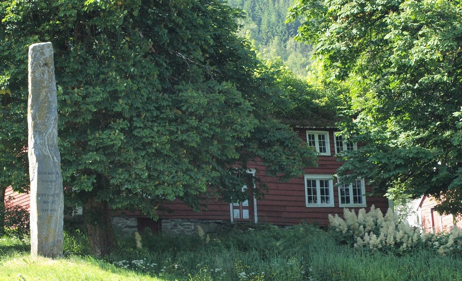 Fødestaden til Sivert Aarflot, Ørsta, Noreg